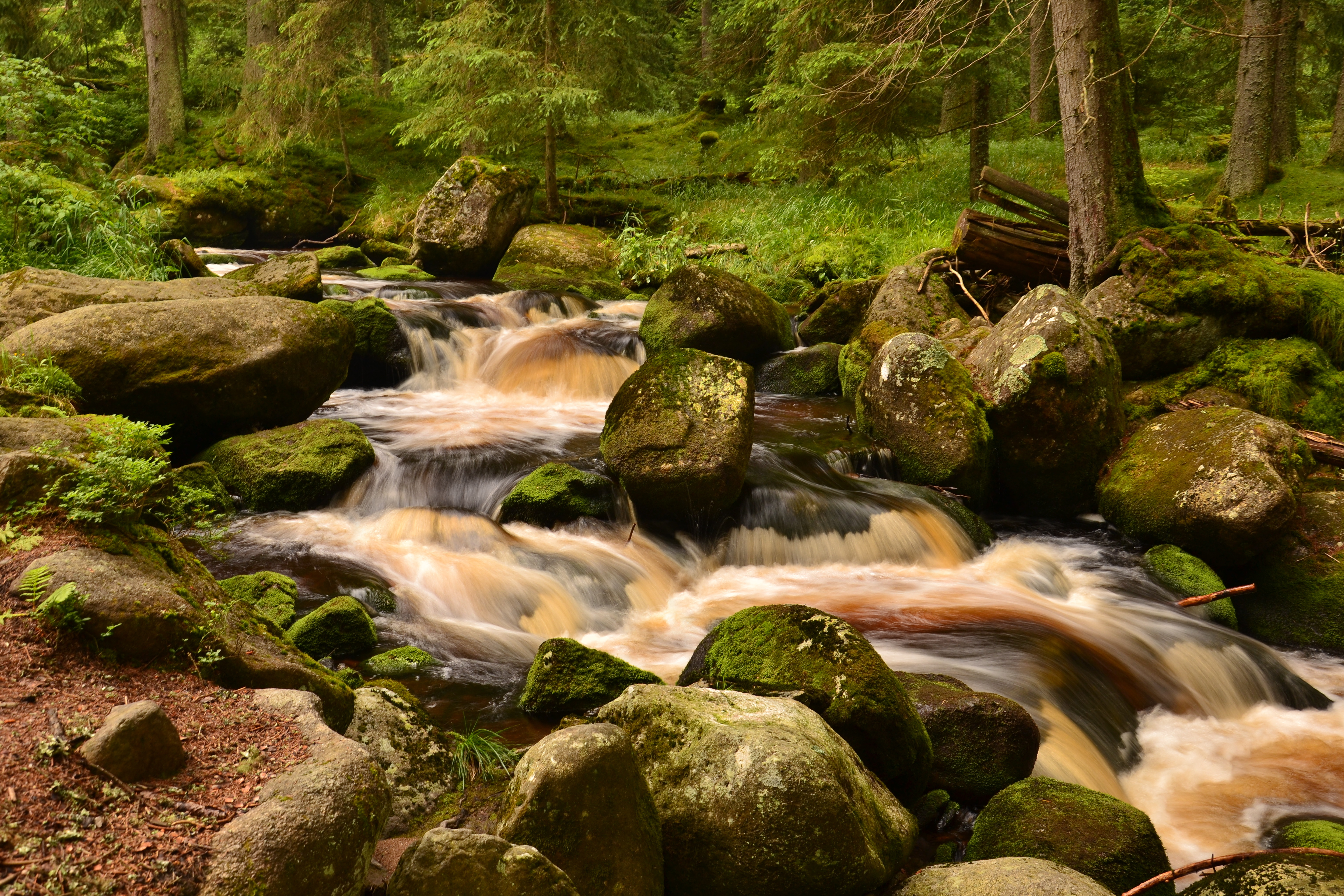 Hamerský potok mezi Antýglem a Horskou Kvildou